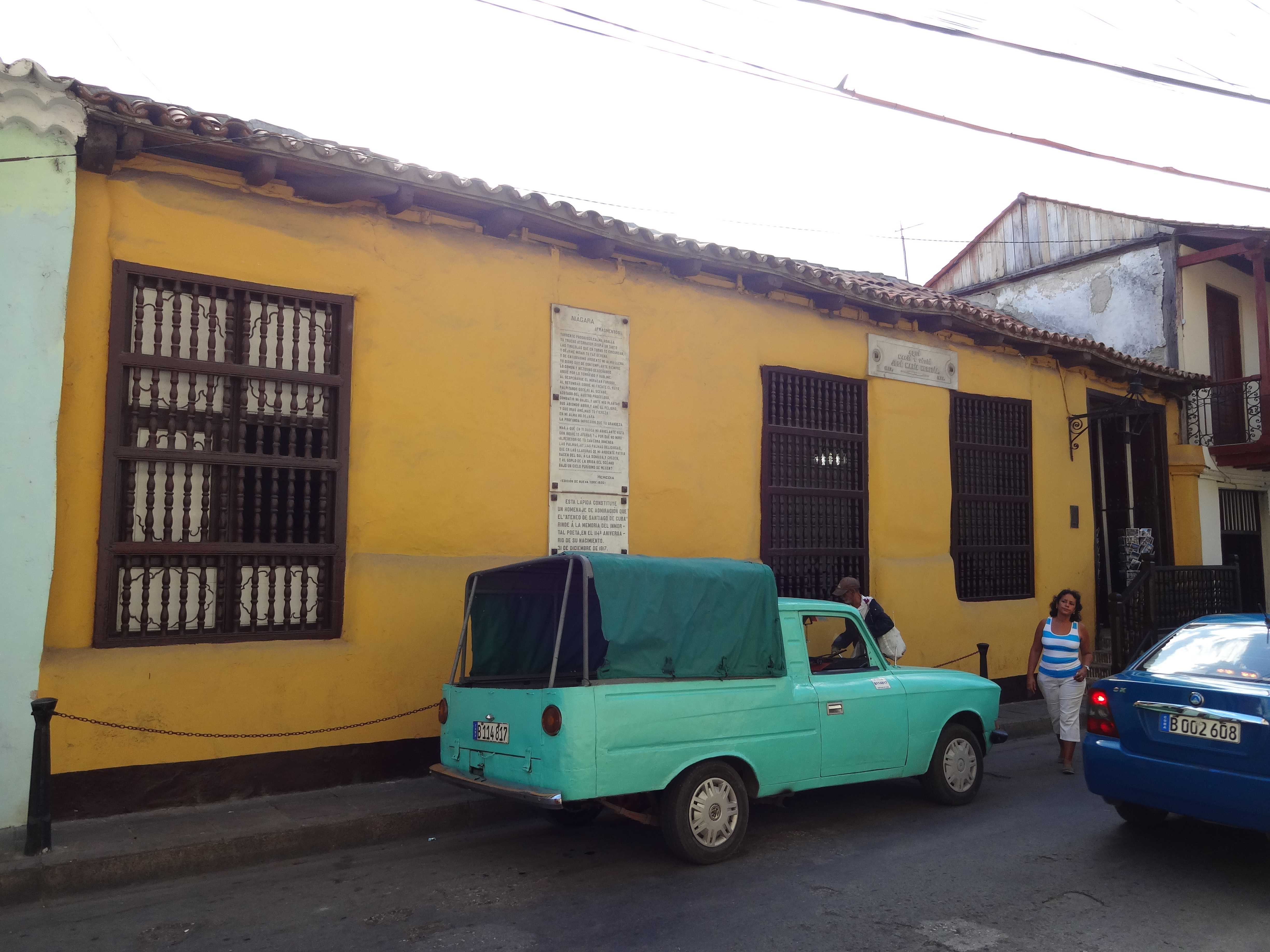 Casa Natal de José María Heredia in Santiago de Cuba